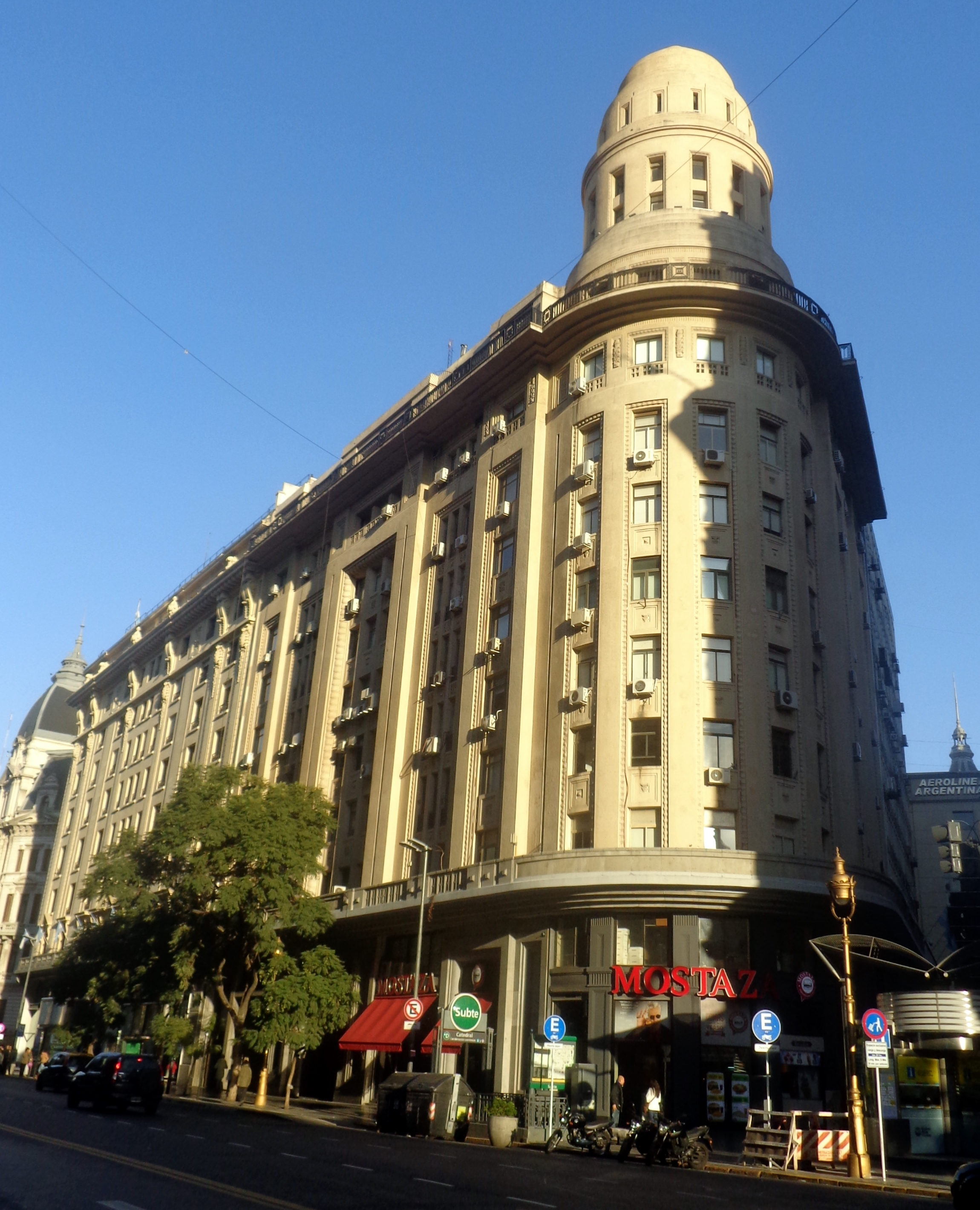 Edificio de la compañía de seguros La Equitativa del Plata, construido en la esquina sudeste de la calle Florida y la Avenida Roque Sáenz Peña. Proyectado por el arquitecto Alejandro Virasoro en 1927. Buenos Aires, Argentina.